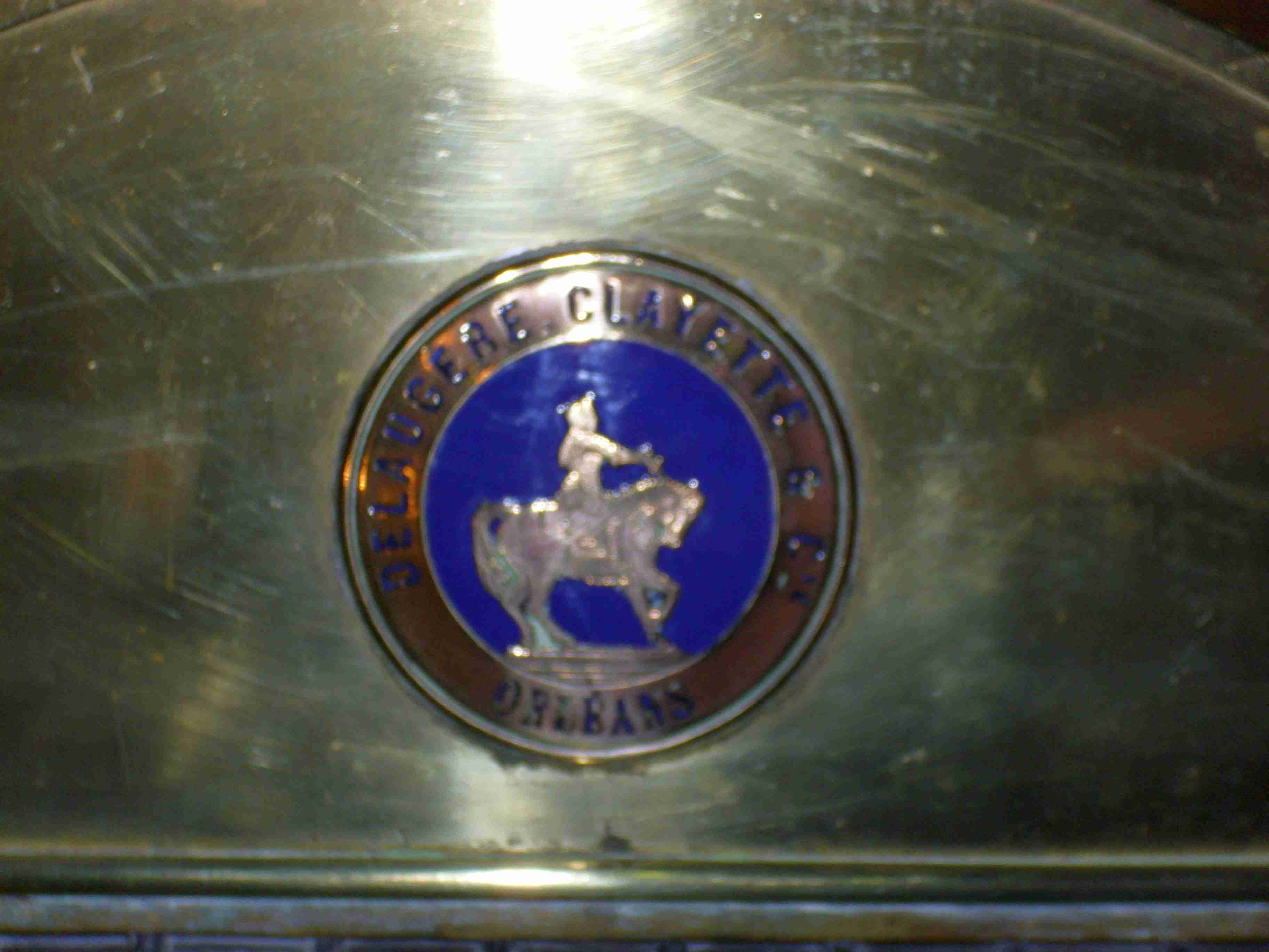 Emblem Delaugère et Clayette